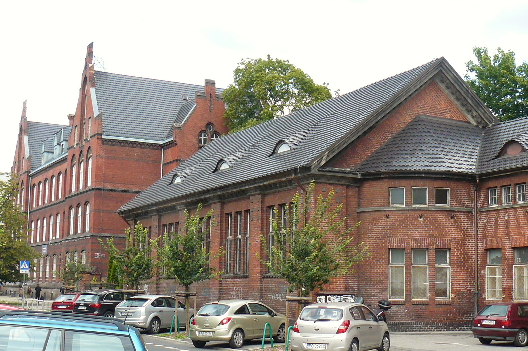 Szkoła przy ul. Słowackiego 54/60 w Poznaniu.